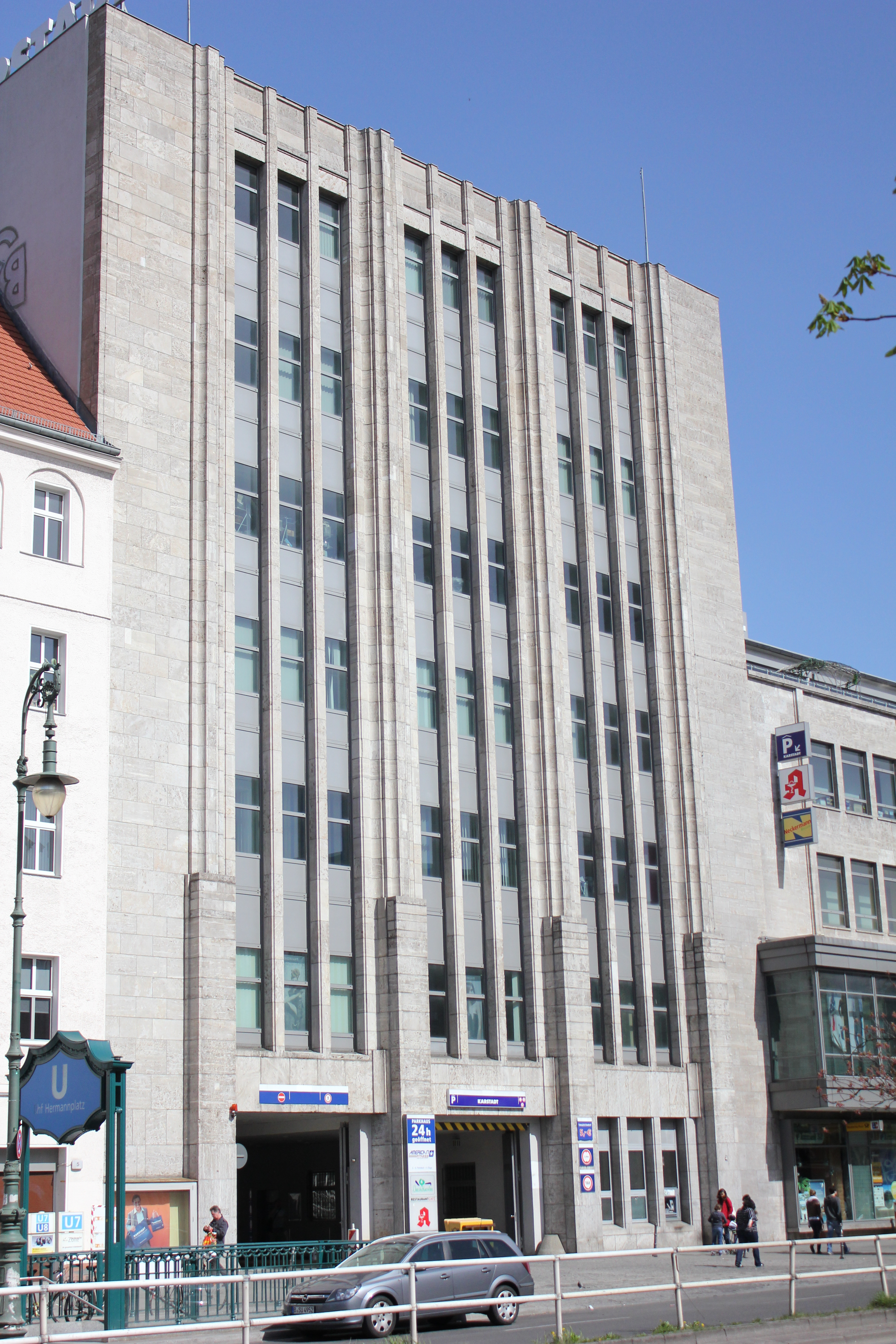 Karstadt Warenhaus am Hermannplatz, Ecke Hasenheide, Berlin Neukölln. Erhaltener Teil der Originalfassade von 1929. Architekt: Philipp Schäfer.